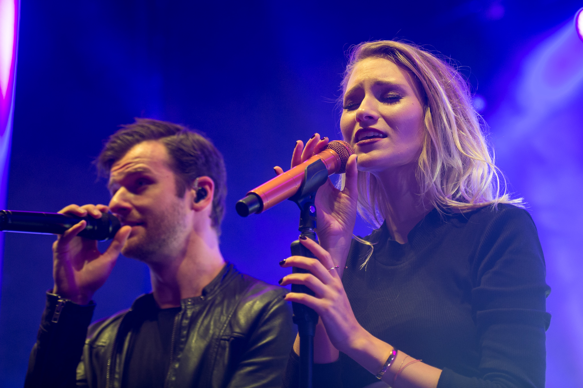 Carolin Niemczyk,Concertbüro Franken,Daniel Grunenberg,Glasperlenspiel,Konzert,Livekonzert,Livemusik,Löwensaal,Musik,Tag X Tour